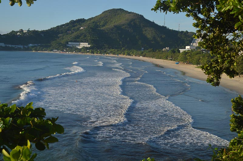 Praia das Toninhas, Ubatuba SP